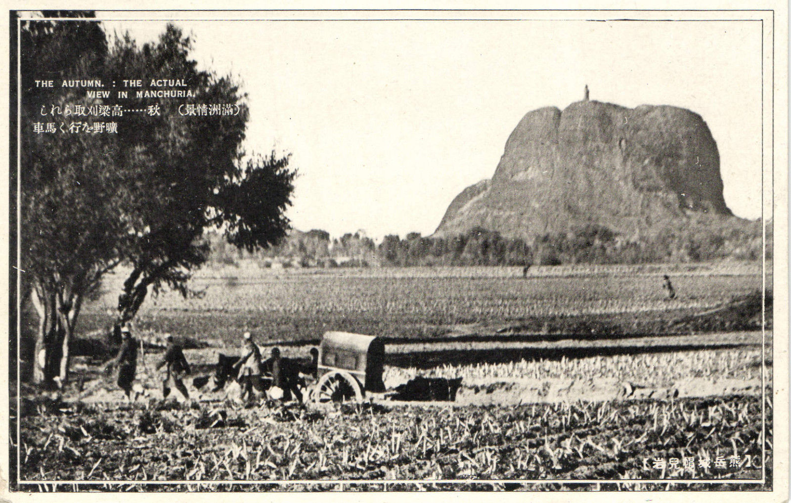 满洲秋景，熊岳帽儿岩